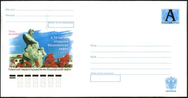 Ишимбай / Ishimbay